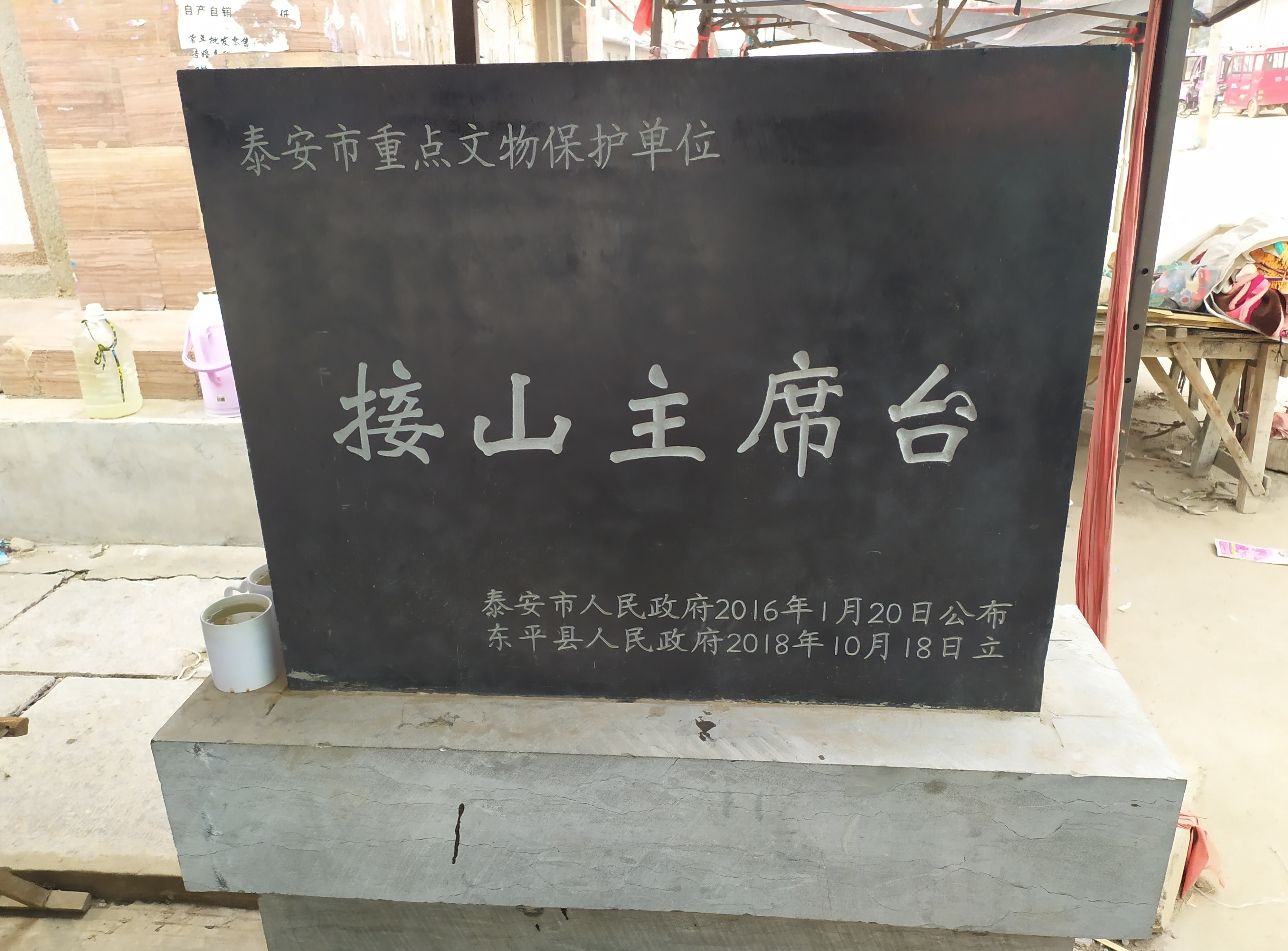 中文（中国大陆）: 接山主席台市级文物保护单位碑